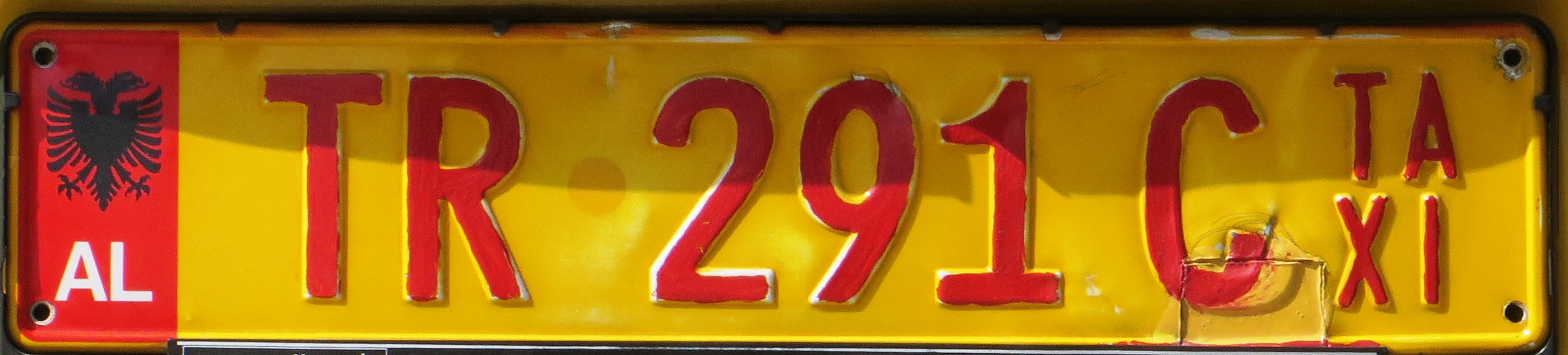 taxi kenteken Albanië